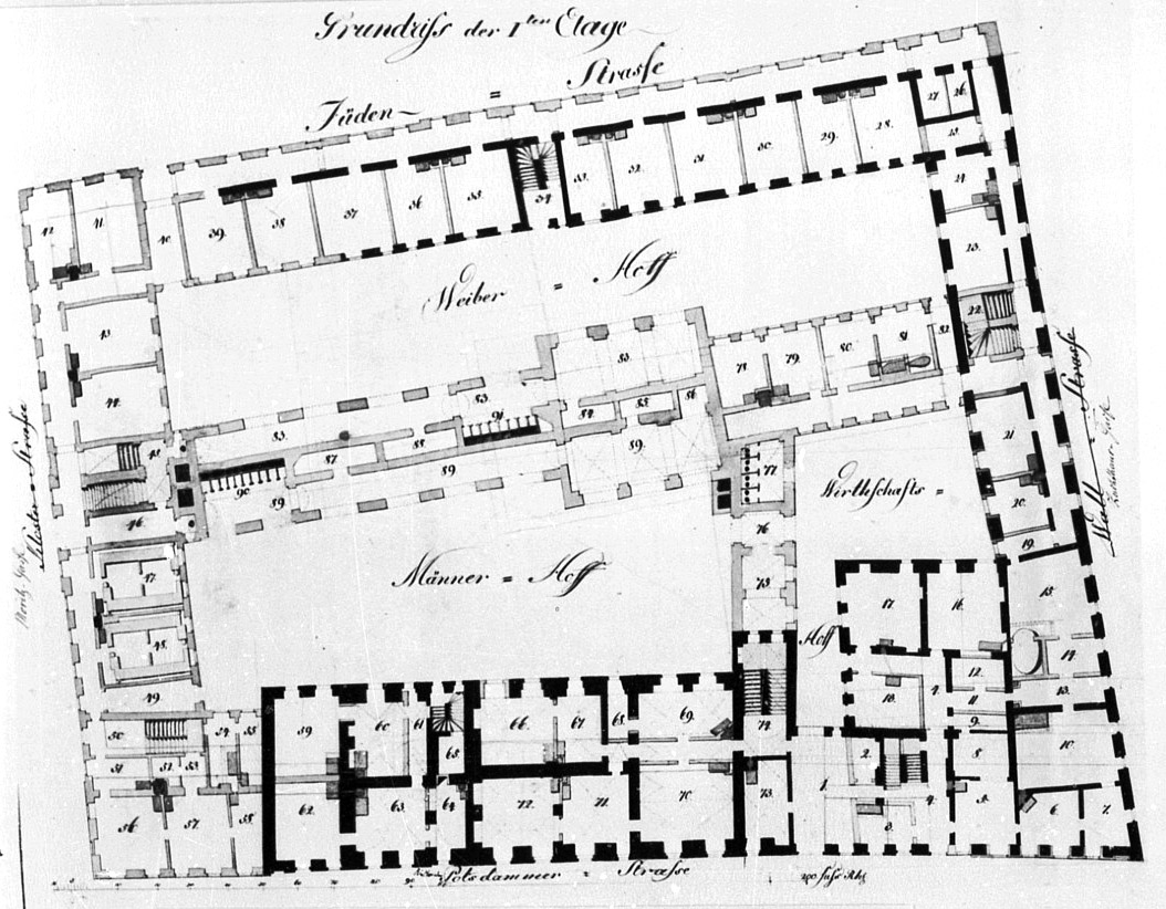 Zuchthaus Spandau - Grundriss der 1. Etage Federzeichnung Zuchthaus von Spandau zwischen der Potsdammer Straße (heute Carl-Schurz-Straße) und der Jüdenstraße.